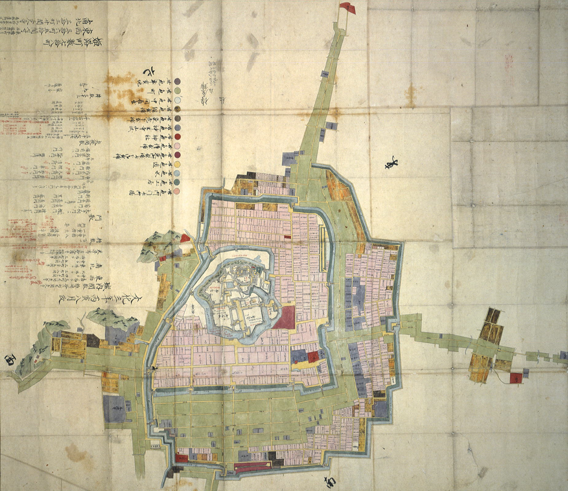 「姫路城下絵図」。姫路城下と街道沿いの町割りを描いたもの。文化３年（１８０６年）。兵庫県立歴史博物館所蔵。